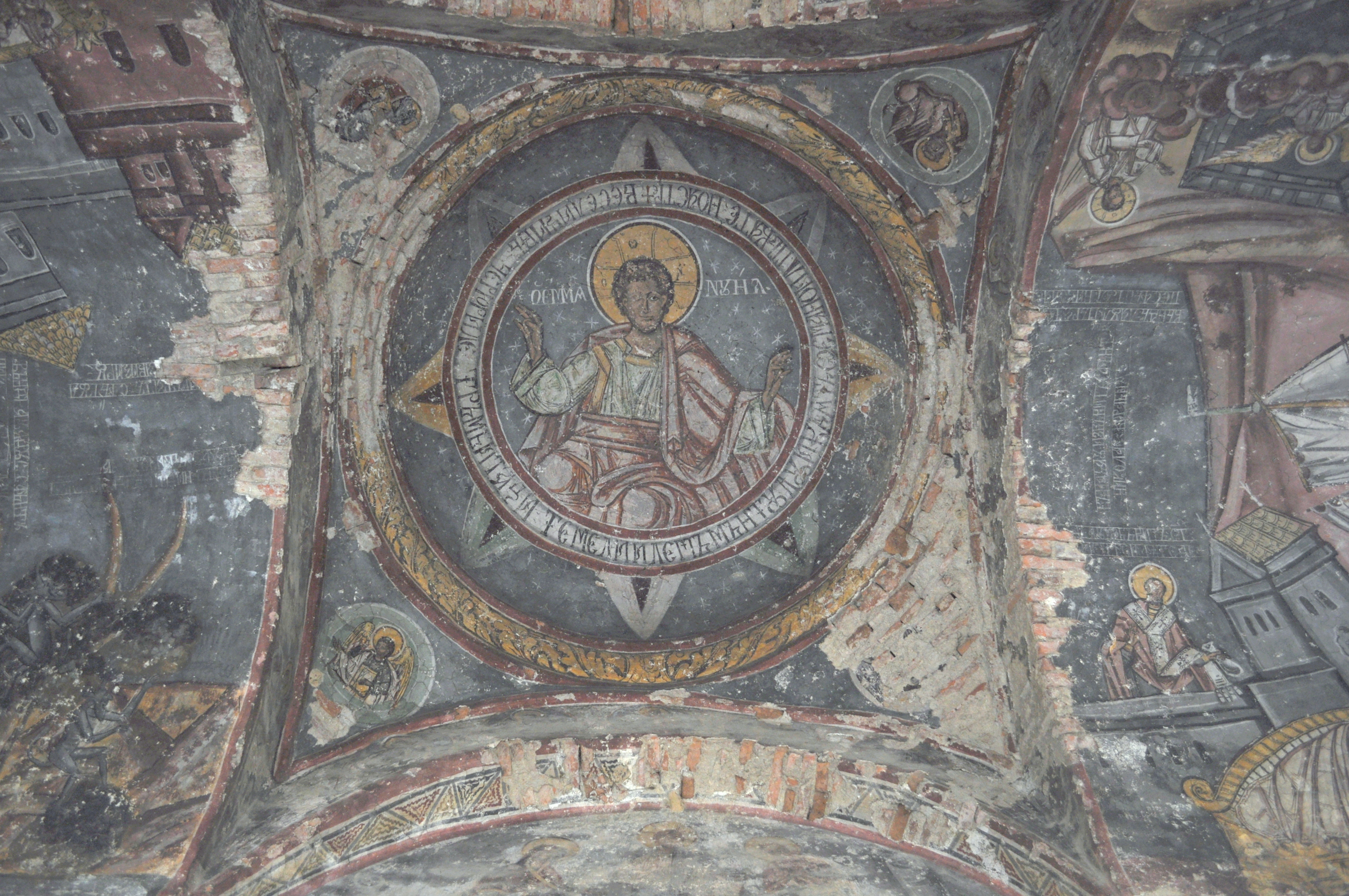 Ansamblul bisericii „Sf. Nicolae”, sat Cerneți; comuna Șimian